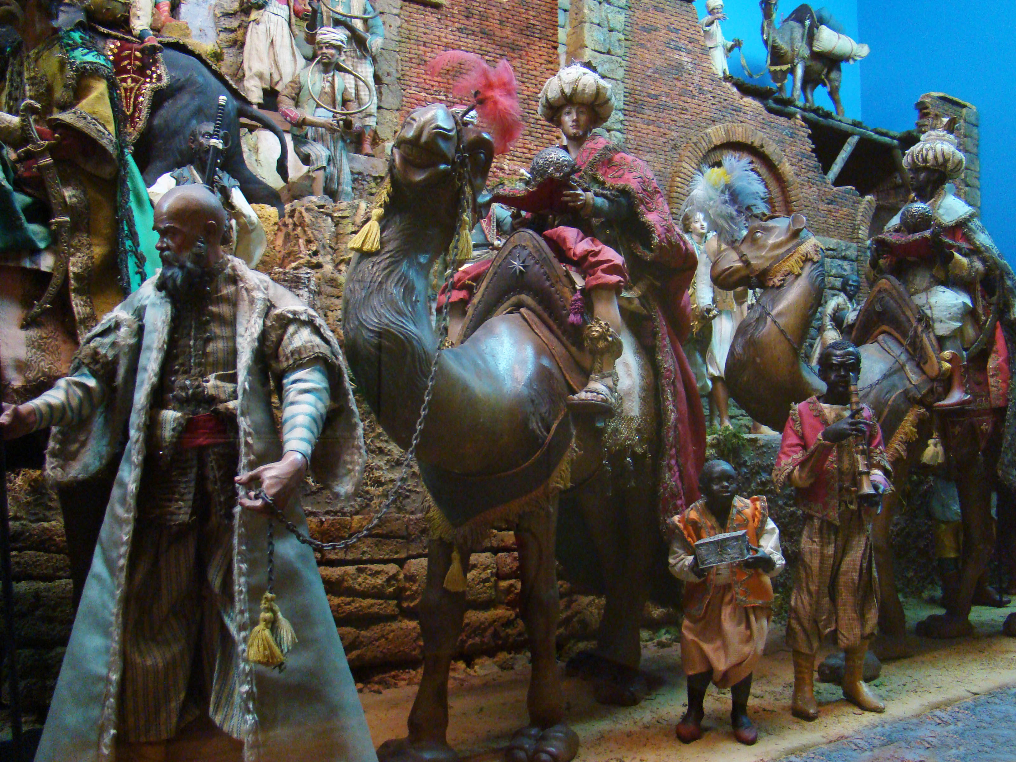 Belén napolitano que se exhibe en el Museo Nacional de Escultura en Valladolid (España). Se encuentra en el edificio del Palacio de Villena. Escena de la llegada de los Reyes Magos.